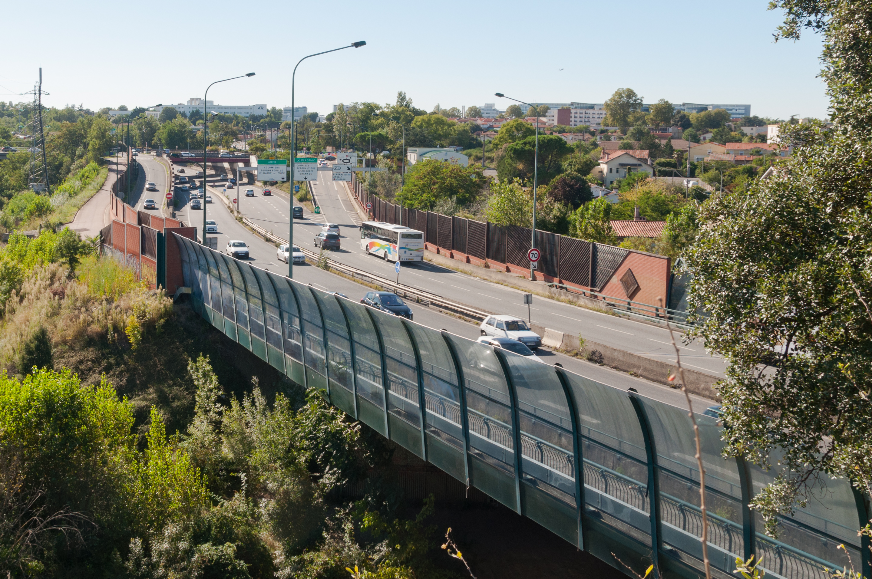 Autoroute A621 ("Fil d'Ariane") à Toulouse depuis un point de vue du quartier Ancely. Le pont d'Ancely enjambe ici le Touch qui sépare Toulouse (à gauche) de Blagnac (à droite) afin de franchir la Garonne.